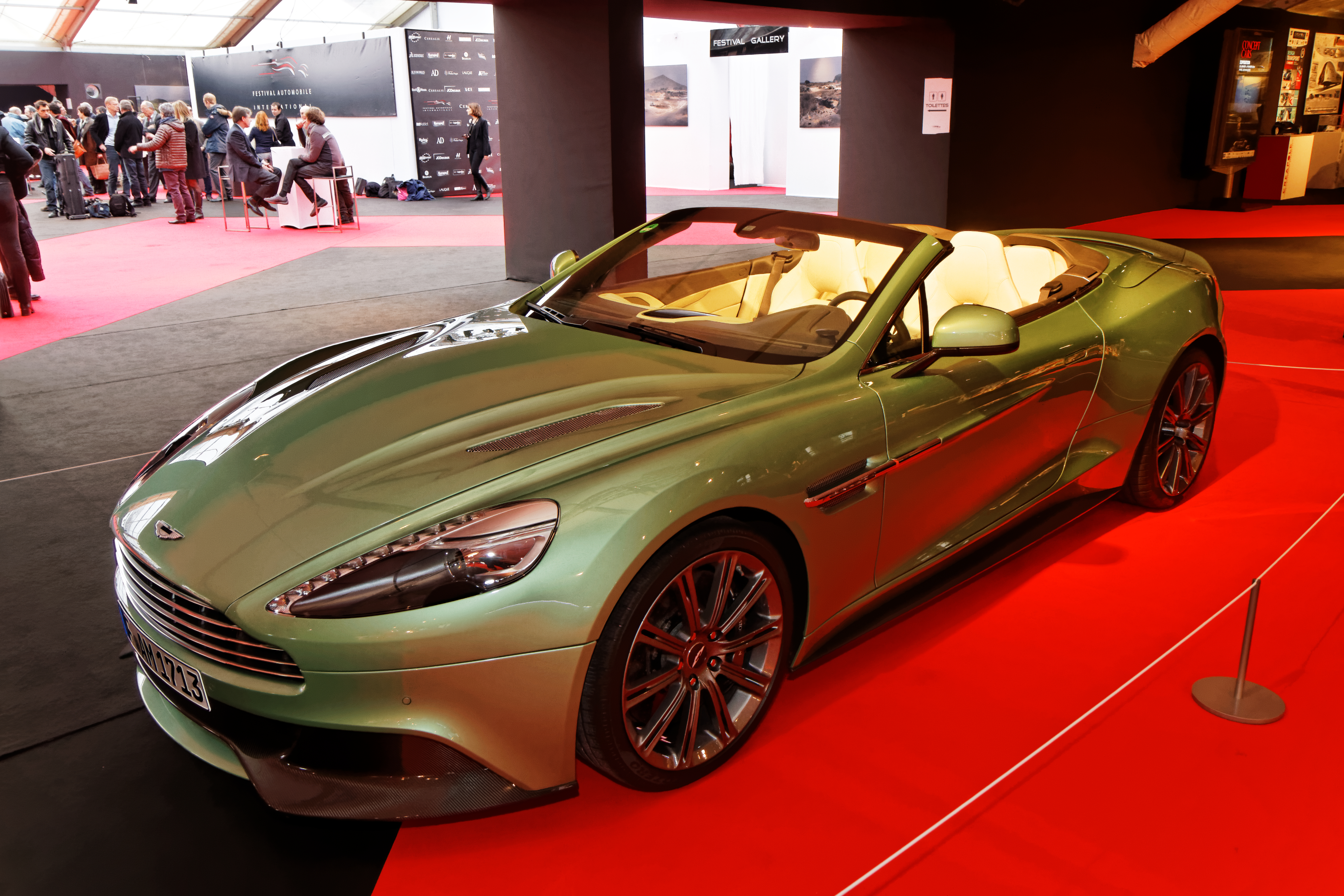 L'Aston Martin Vanquish Volante exposée lors du festival automobile international 2014.